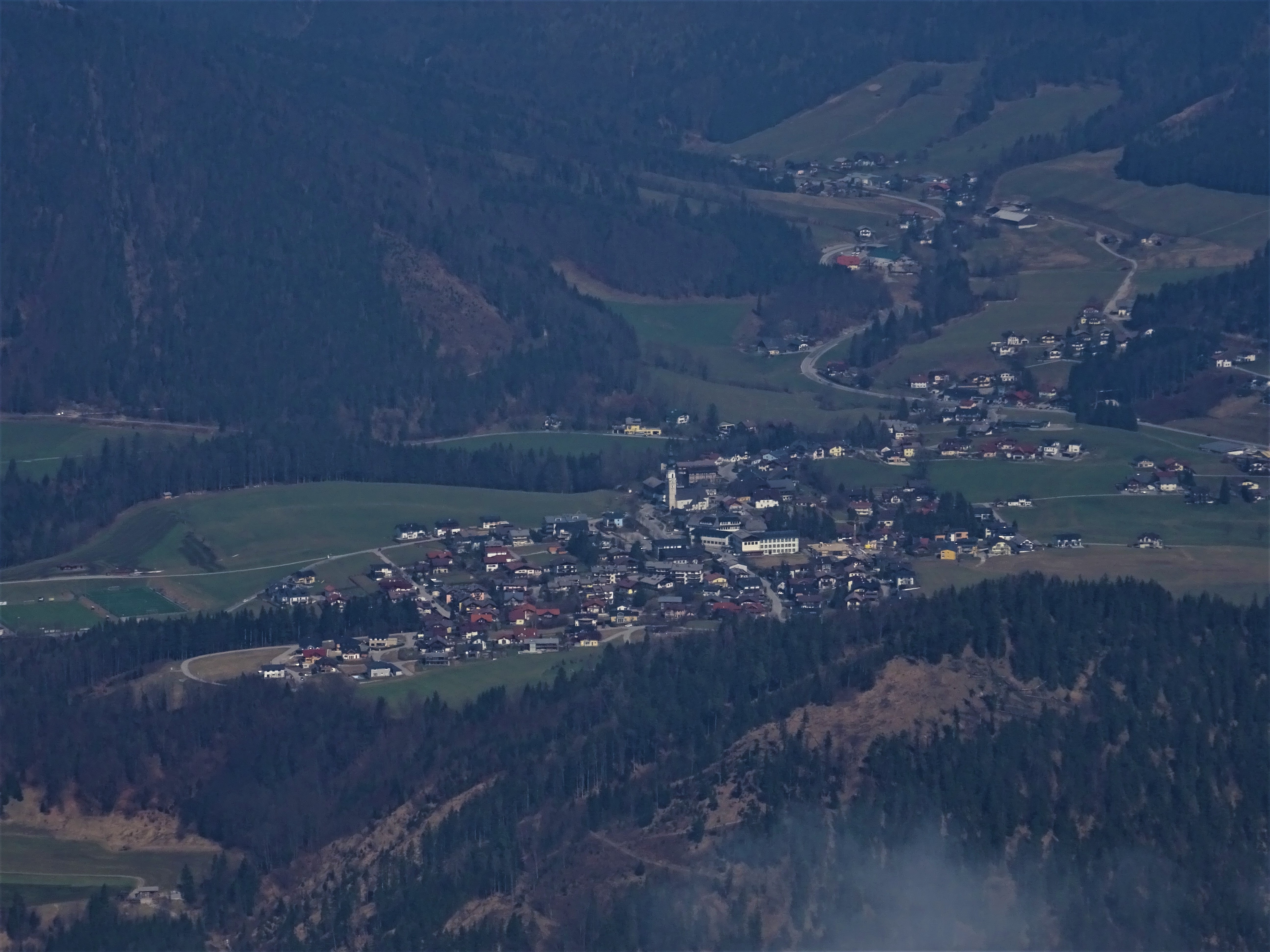 Der Hauptort vom nahegelegenen Eibleck aus gesehen